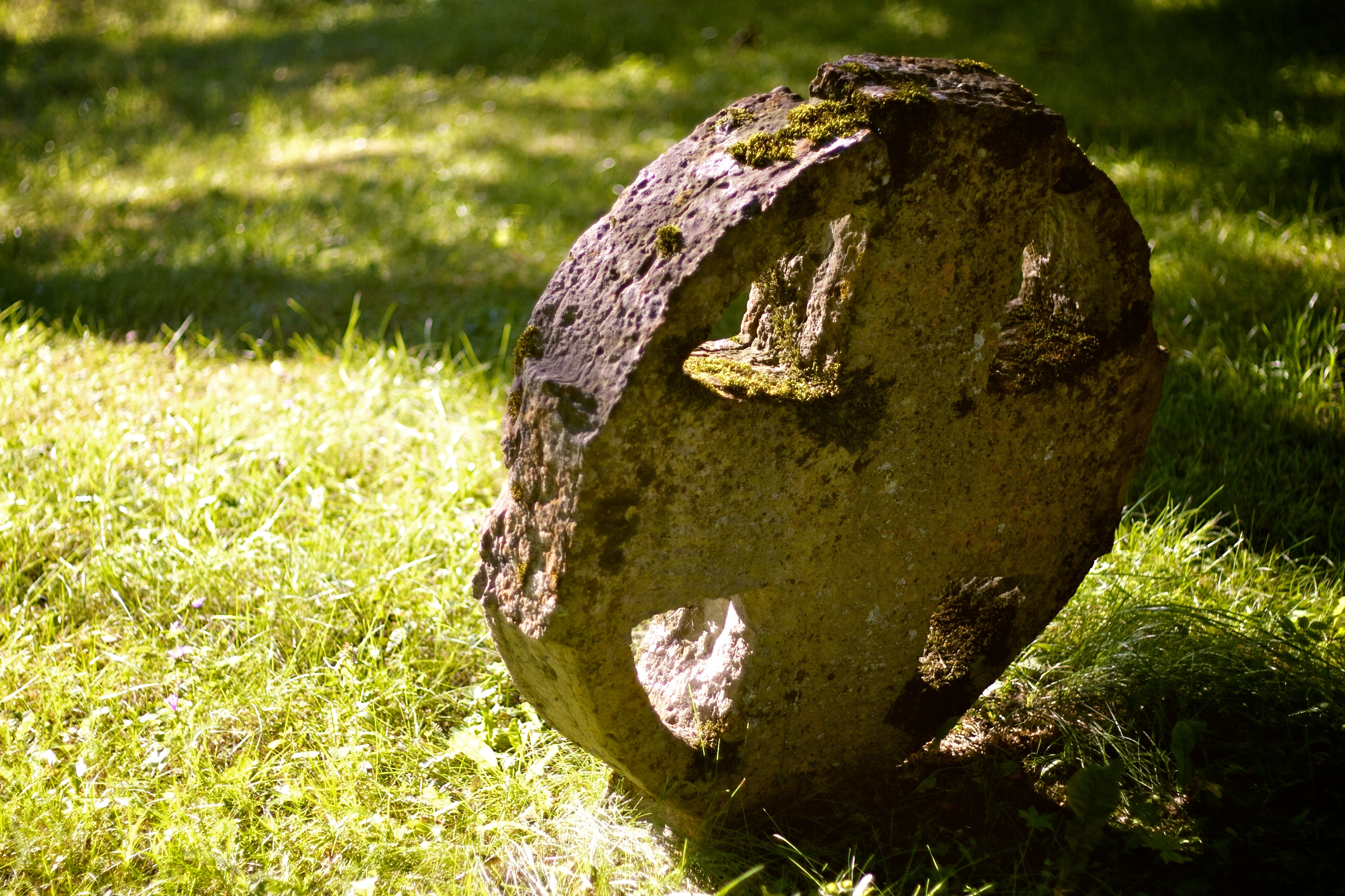 Ratasrist Karuse kirikuaias